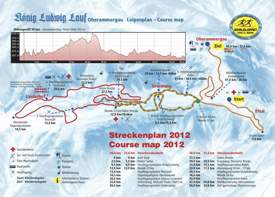 Loipenplan König Ludwig Lauf mit Verpflegungsstellen und Servicepunkten 2012 bis auf weiteres